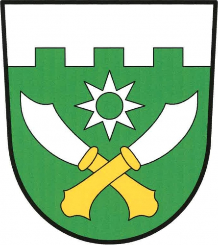 znak, Hostouň, okres Kladno